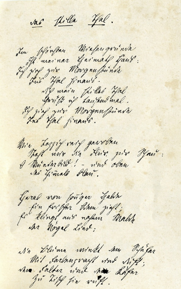 Reproduktion des Gedichtes Im schönsten Wiesengrunde in der Handschrift Wilhelm Ganzhorns.